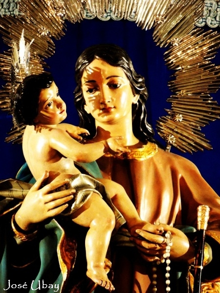 Nuestra Señora de la Luz. 1799. José Miguel Luján Pérez. Parroquia de Nuestra Señora de la Luz - Las Palmas de Gran Canaria.